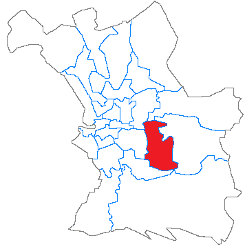 Situation du canton dans la ville de Marseille